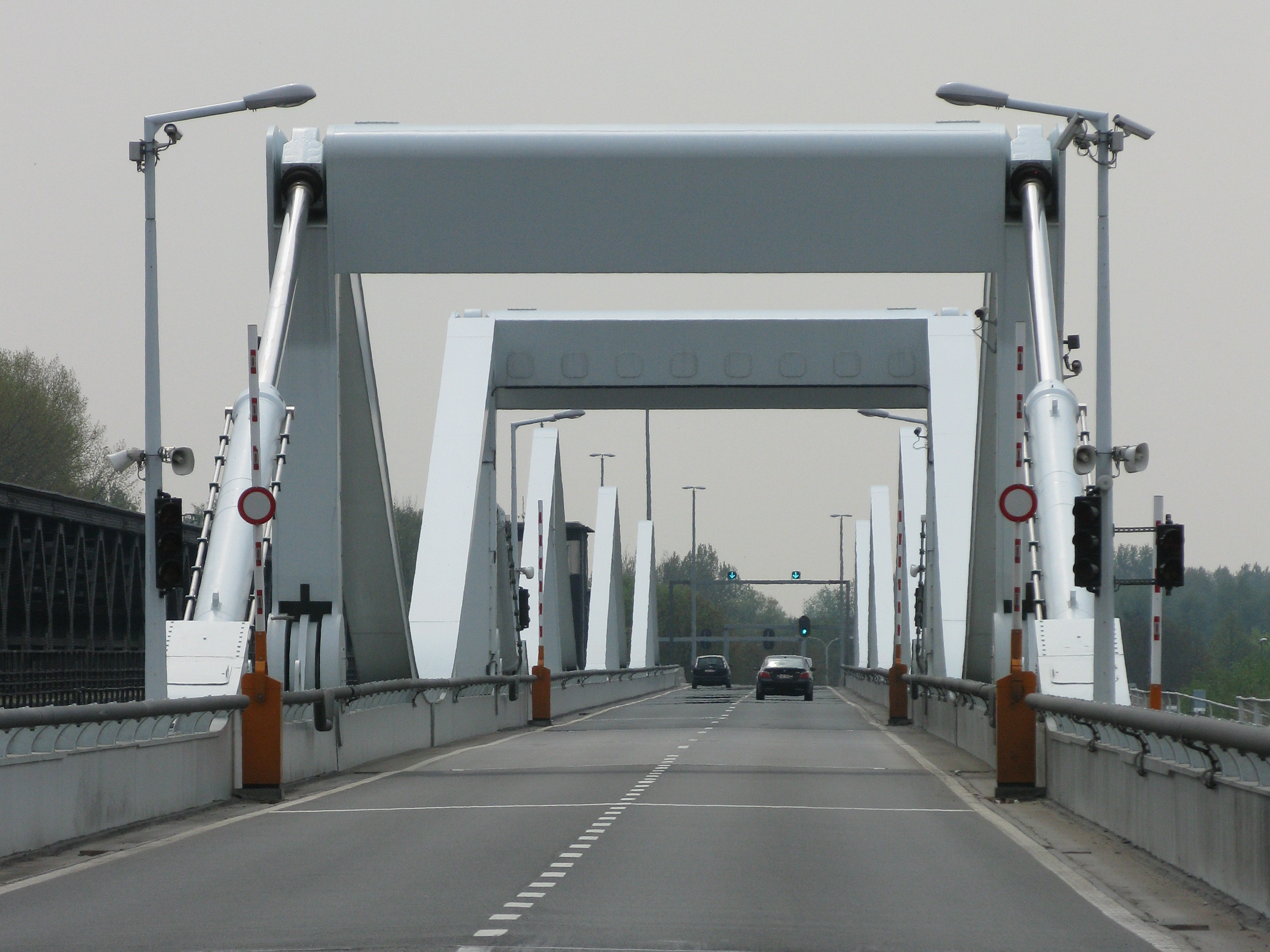 Nieuwe Scheldebrug in Temse (dubbele basculebrug)